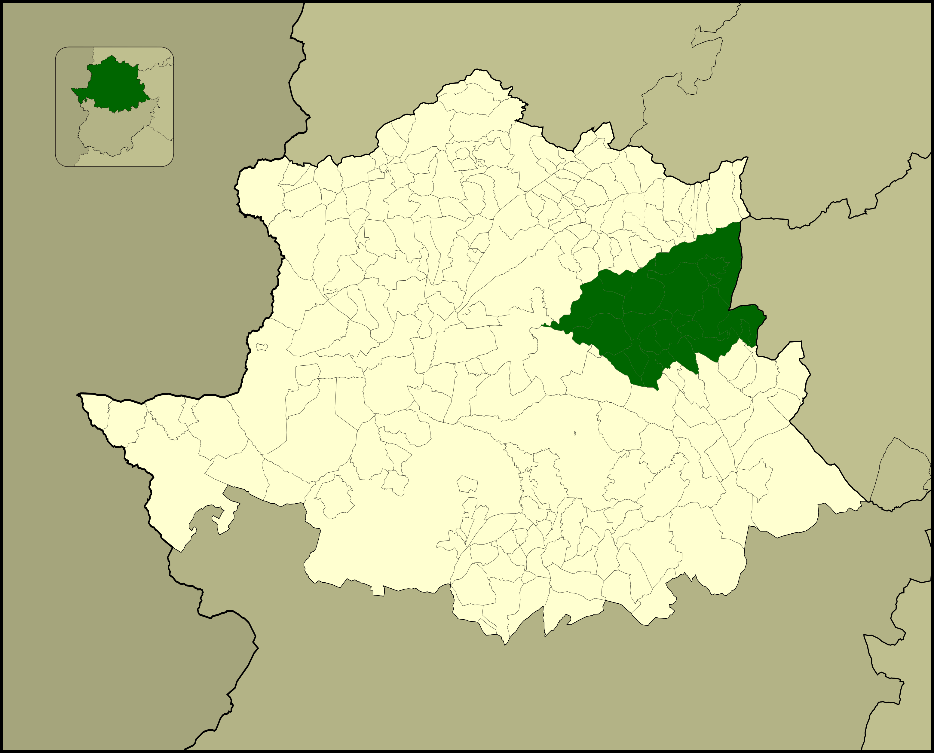 Situación de la comarca de Campo Arañuelo